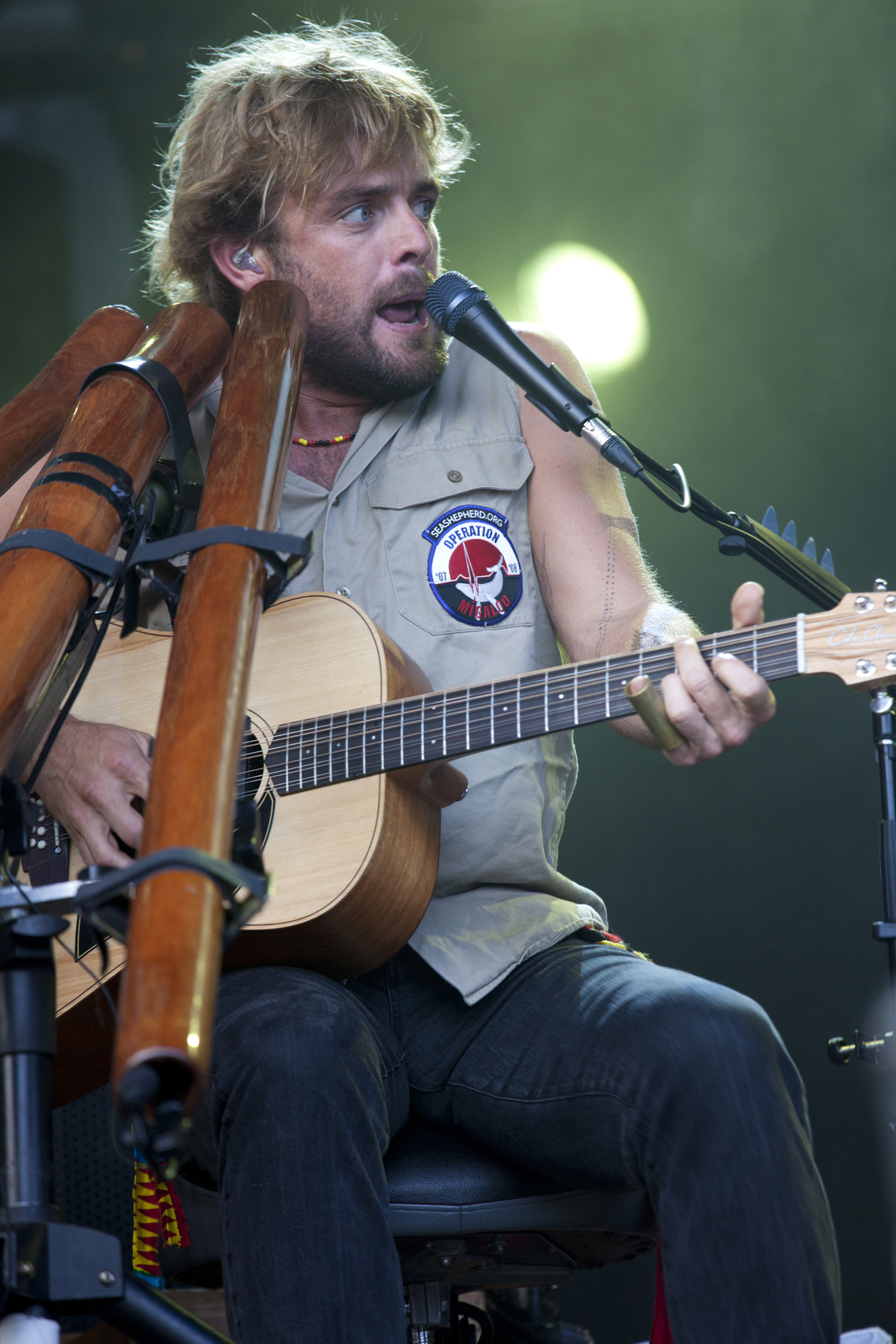 Xavier Rudd - Cruïlla 2010